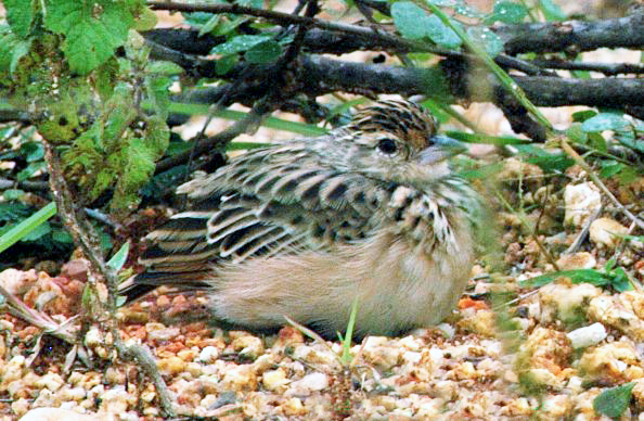 Mirafra affinis, India